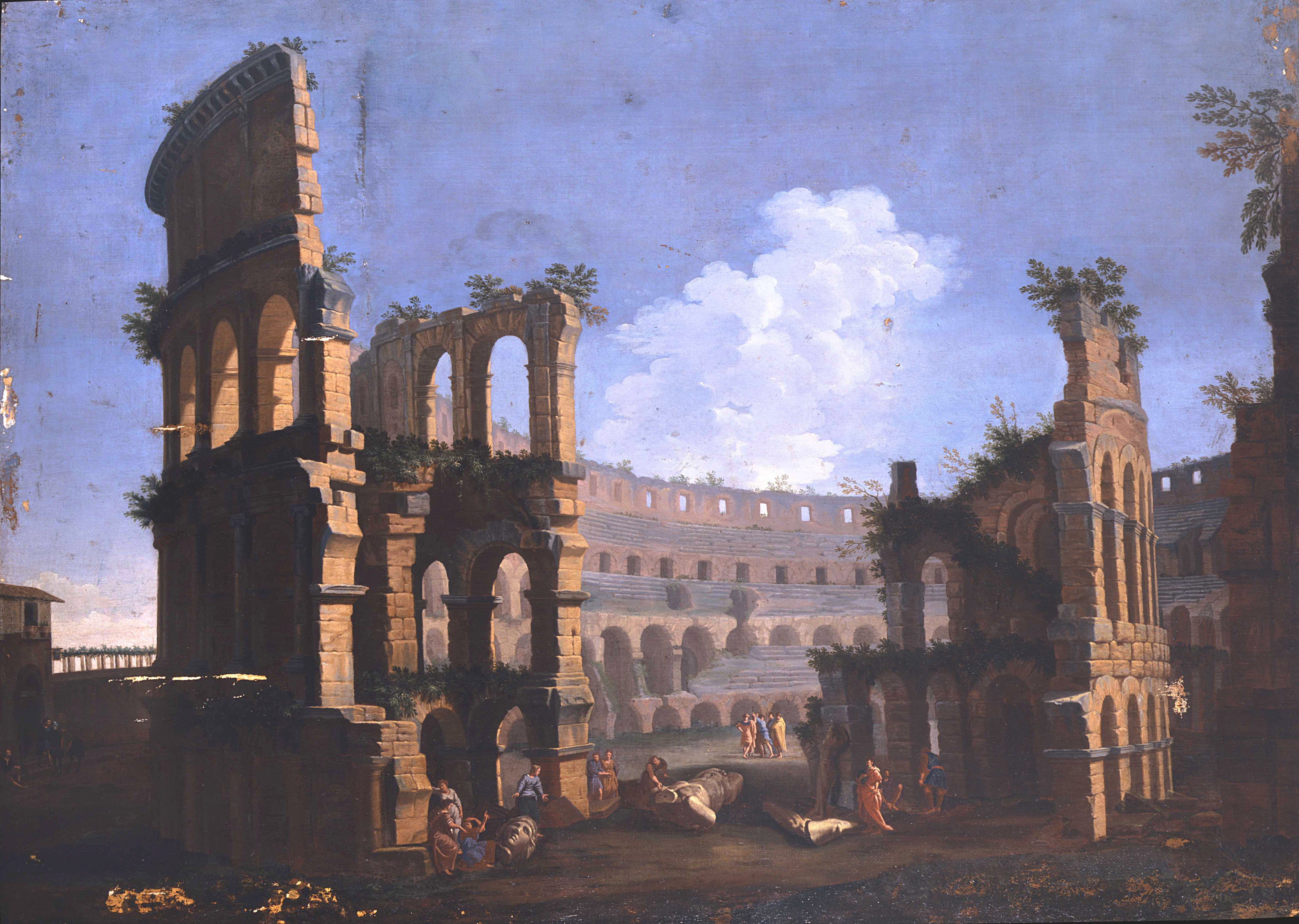 Veduta del Colosseo con archeologi e operai al lavoro Olio su tela 123x172 cm